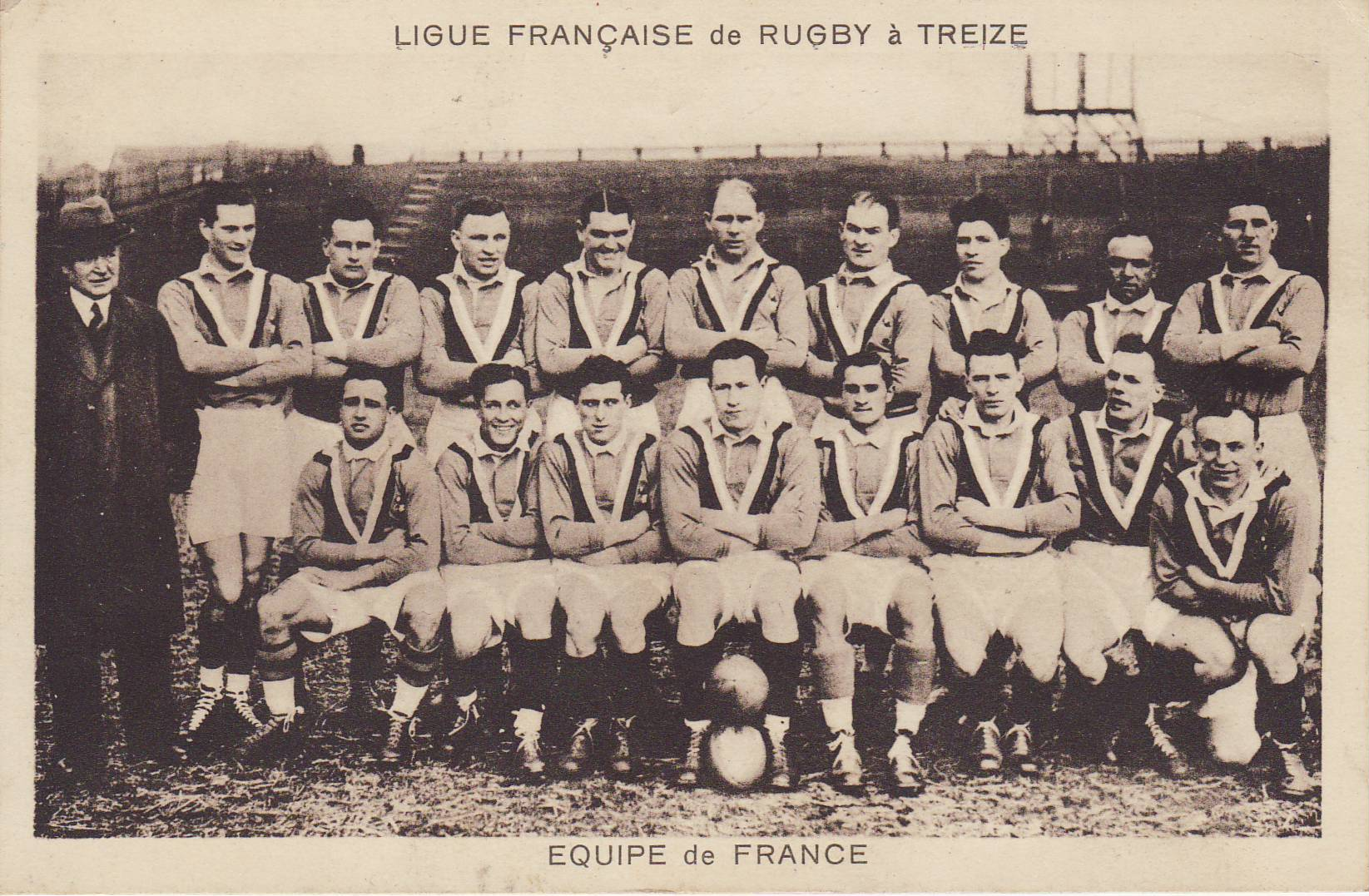 Photo représentant la première sélection française de rugby à XIII prise en mars 1934 à l'occassion de la tournée des Pionniers en Angleterre. De gauche à droite : debout : Nouel, Fabre, Mathon, Duhau, Petit, Deschavannes, Porra, Carrère, Blanc ; Assis : Cassagneau, Lambert, Vignal, Galia, Amila, Barbazangues, Samatan, Récaborde.